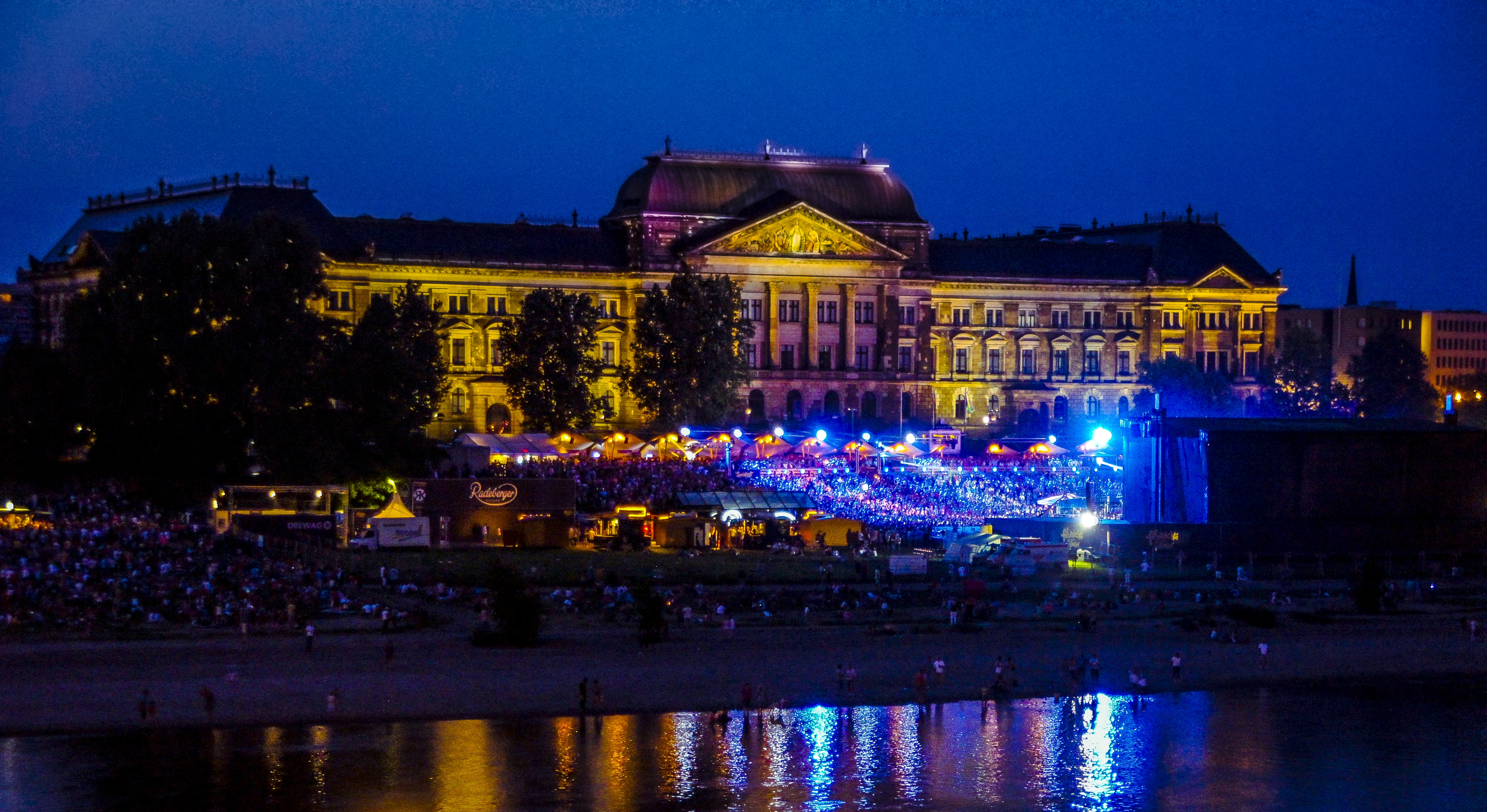 Open Air Konzert von Roland Kaiser, am 3. August 2013. (12000 Besucher). Freihand Foto von den Brühlschen Terrassen.